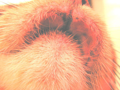 Granulome_eosinophilique_du_chat2.jpg